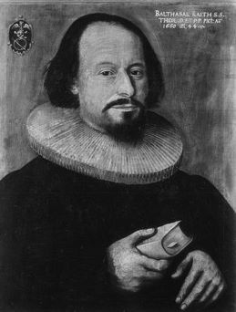 Gemälde in der Professorengalerie Tübingen